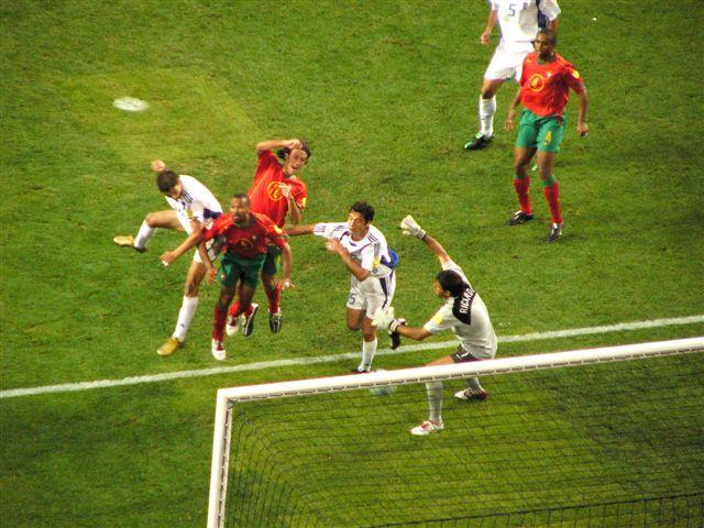 Angelos Charisteas köpft das 1:0 für Griechenland im Finale der Fußball-Europameisterschaft 2004.